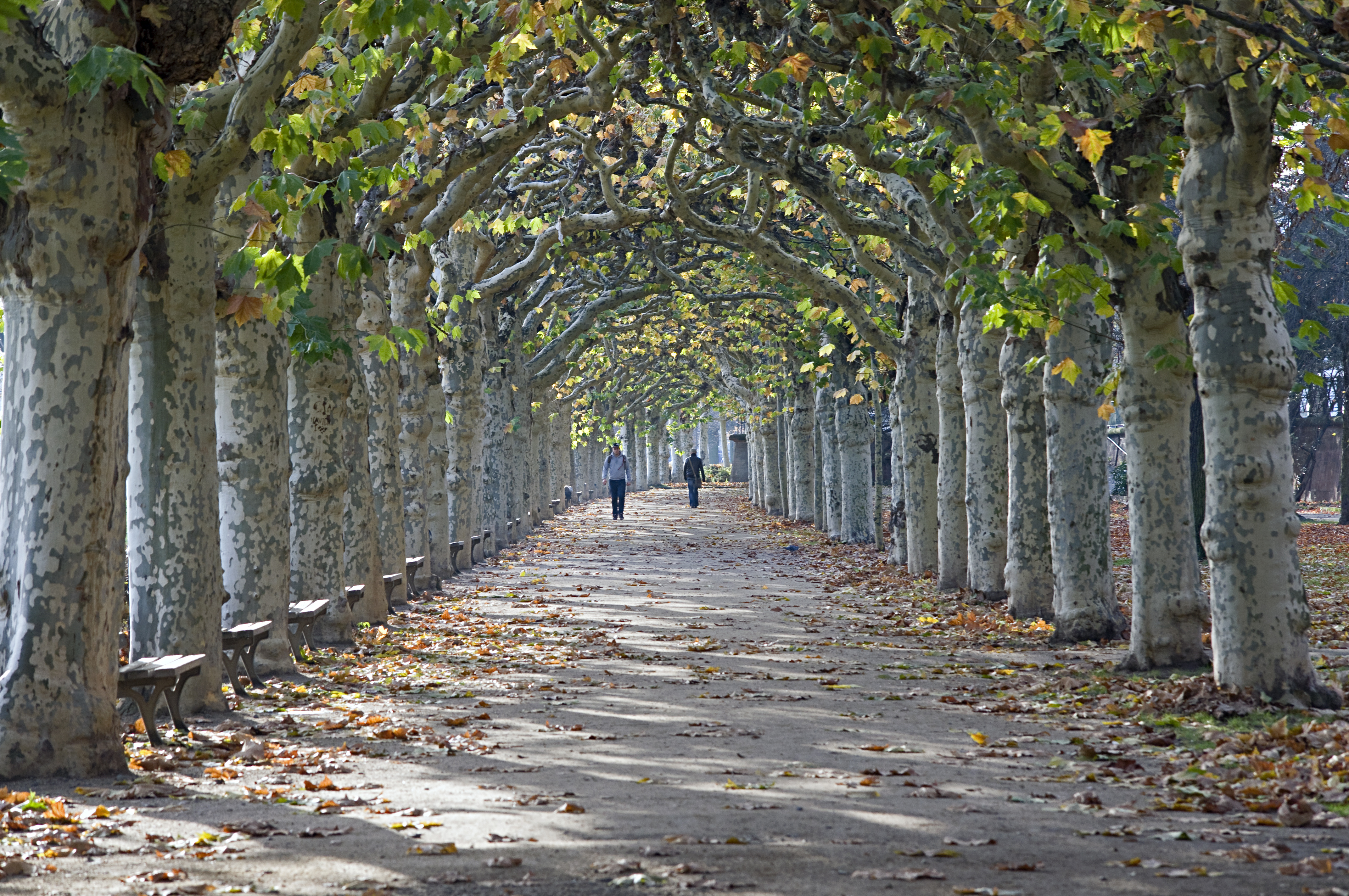 Platanenallee am Nizza im Spätherbst